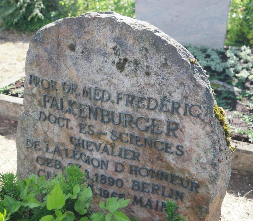 Grab des Anthropologen Frédéric Falkenburger, 1890-1965, auf dem Hauptfriedhof Mainz